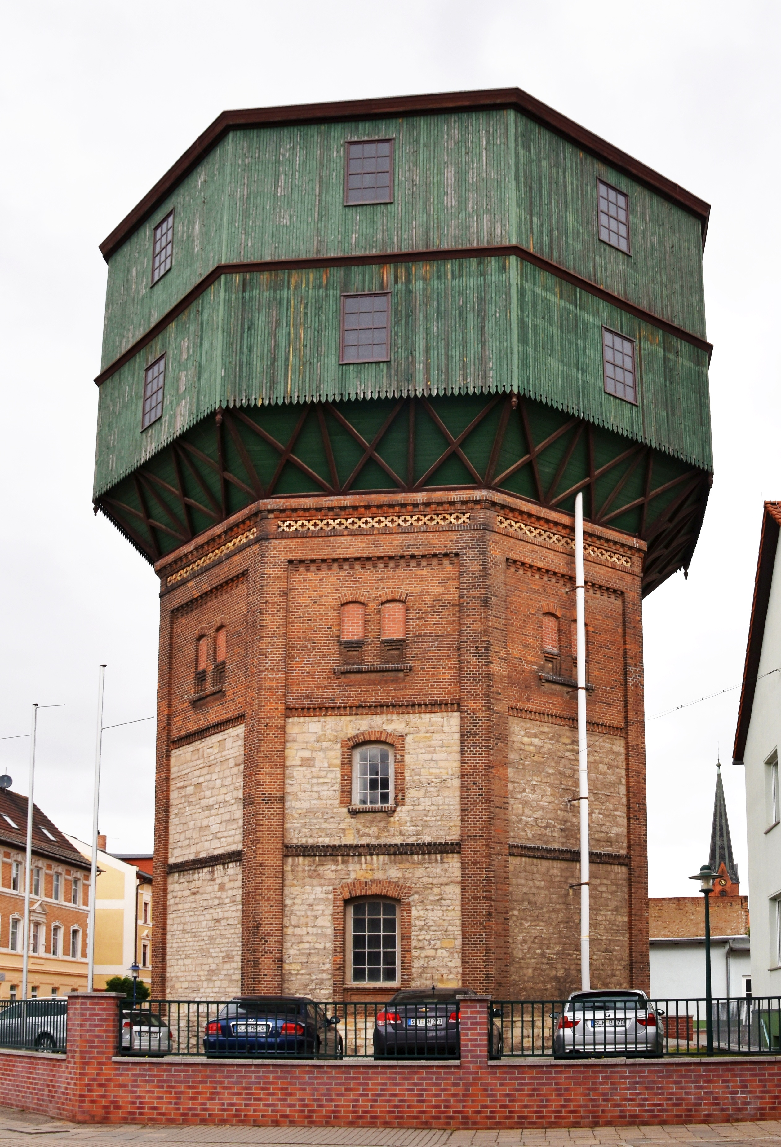 Wasserturm in der Wasserturmstraße in Staßfurt